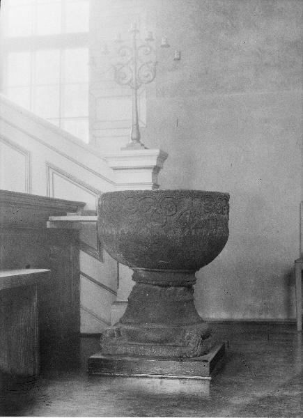 Dopfunt, 1200-talet. Snabbinv. Kategori: (04) DopfuntarDopfunt, 1200-talet. Snabbinv.